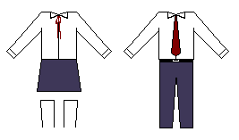 Uniforme del Colegio Nacional de EMD Don Rigoberto Caballero de San Ignacio, Misiones, Paraguay.